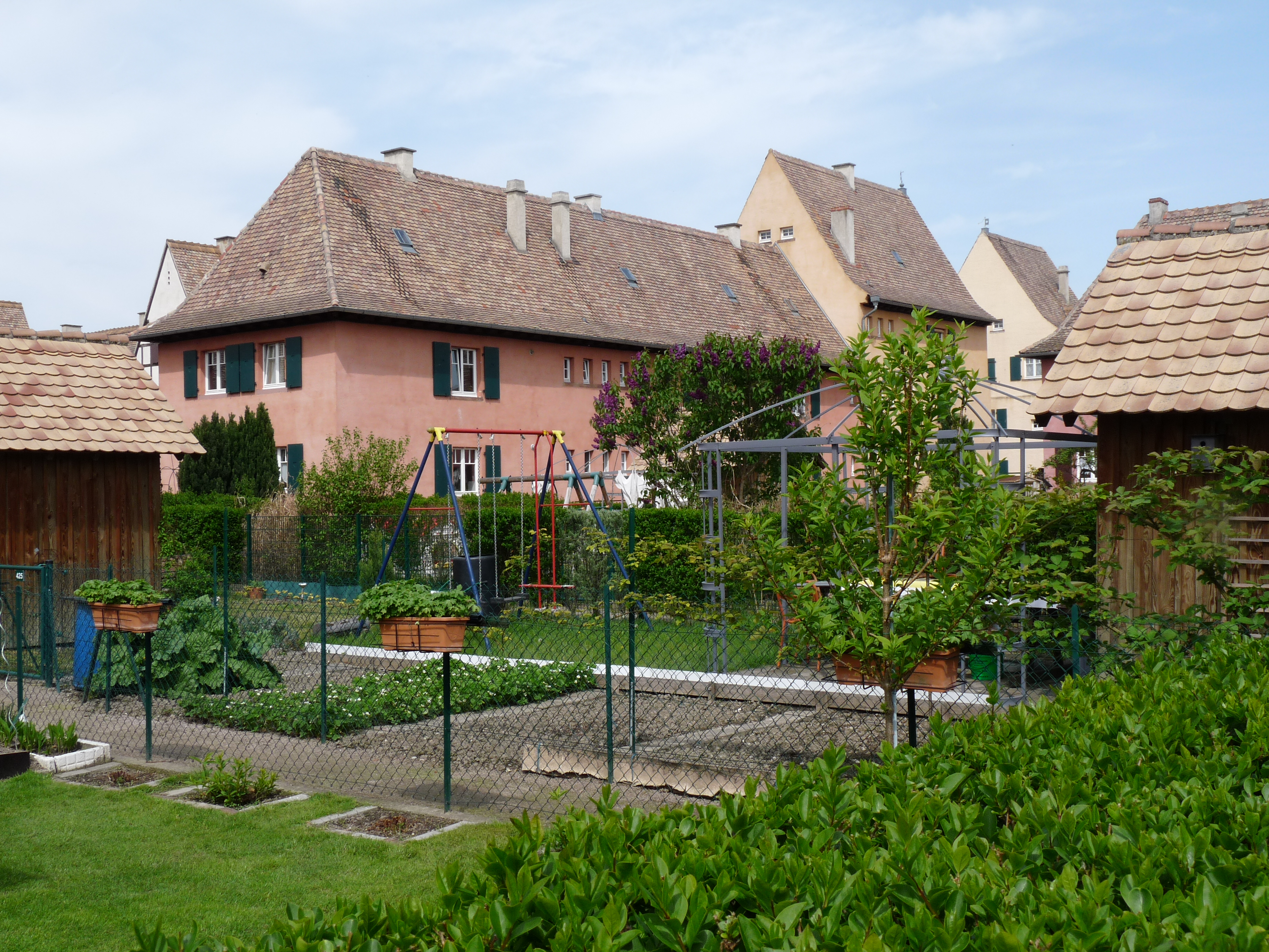 Strasbourg-Neuhof : cité-jardin du Stockfeld ; construction 1910-1912 ; architecte : Edouard Schimpf (mort en 1916) ; inscrit aux MH en 1996 ; rénovation en 2005